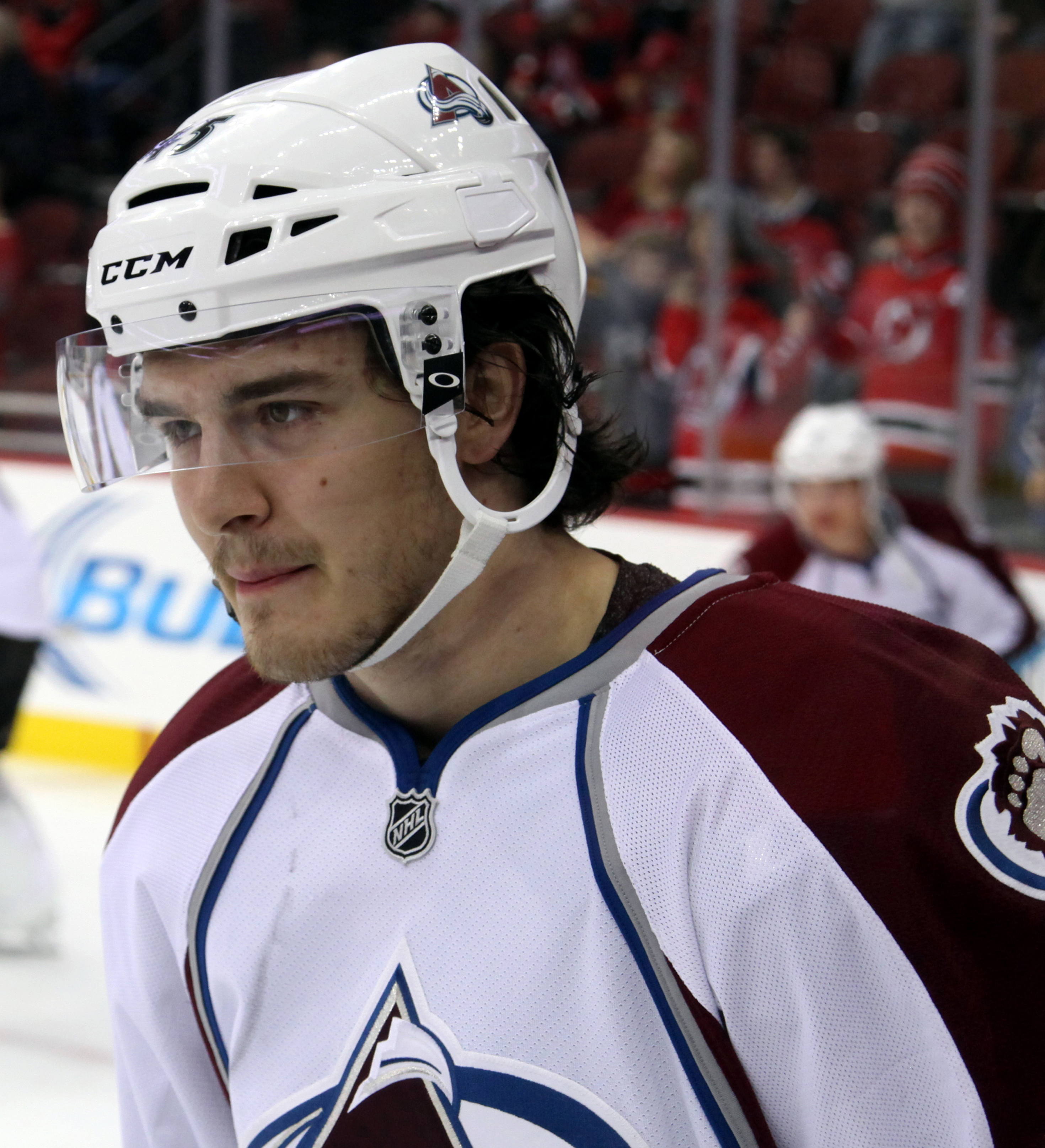 Everberg in November 2014.